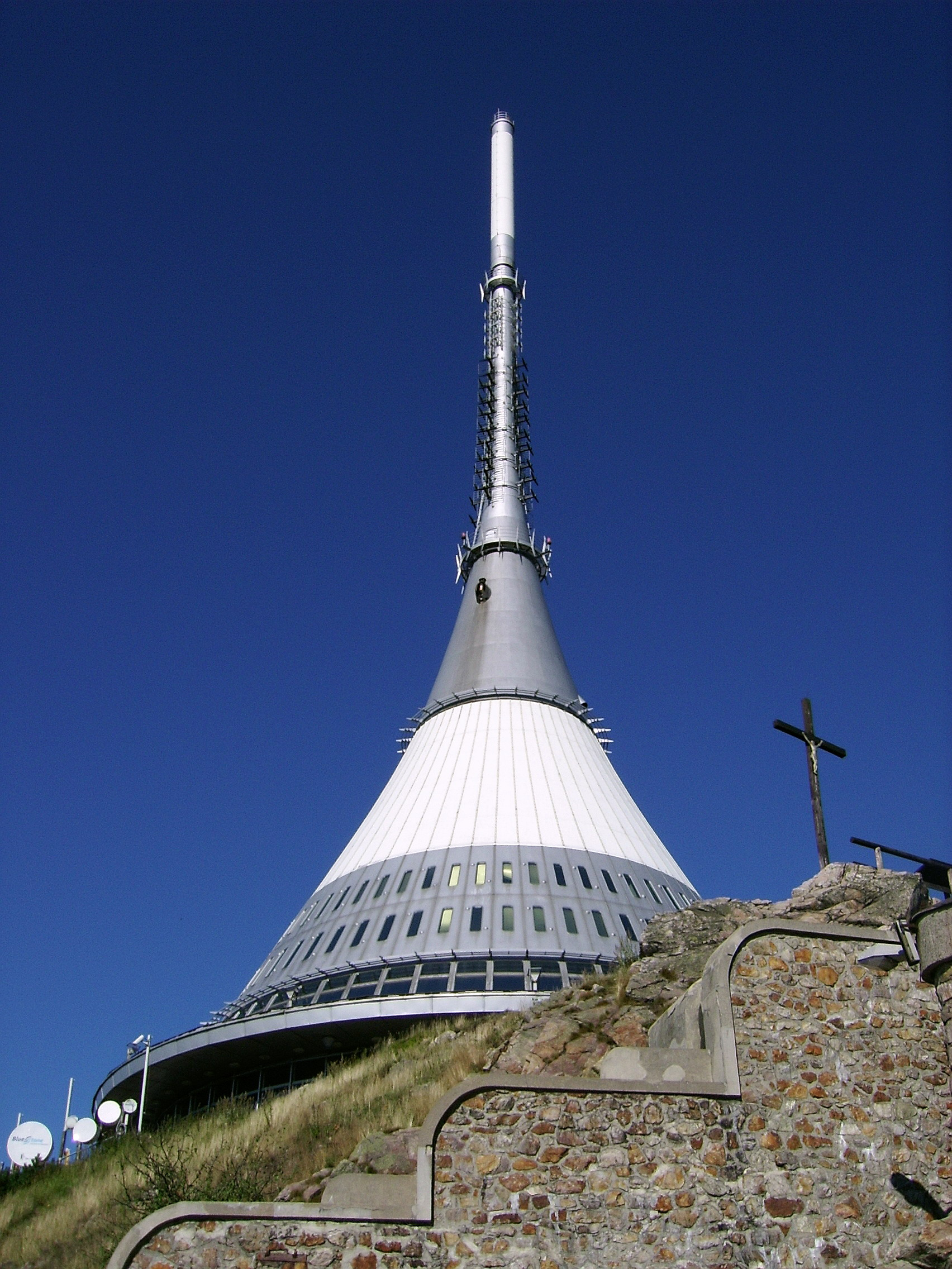 Es handelt sich hier um den 88 Meter hohen Fernsehturm auf dem Berg Ještěd im Jeschkengebirge, der 1.012 Meter hoch ist. Der Berg ist direkt bei der Stadt Liberec. Das Bild hab ich mit meiner Samsung-Digitalkamera aufgenommen. Der Turm dient heutzutage als Restaurant, Sendemast, Hotel und Aussichtsturm. Er wurde von 1966 bis 1973 erbaut. Er dient als Ersatz der 1963 abgebrannten Baude. Zum Fernsehturm gelangt man durch eine Seilbahn.